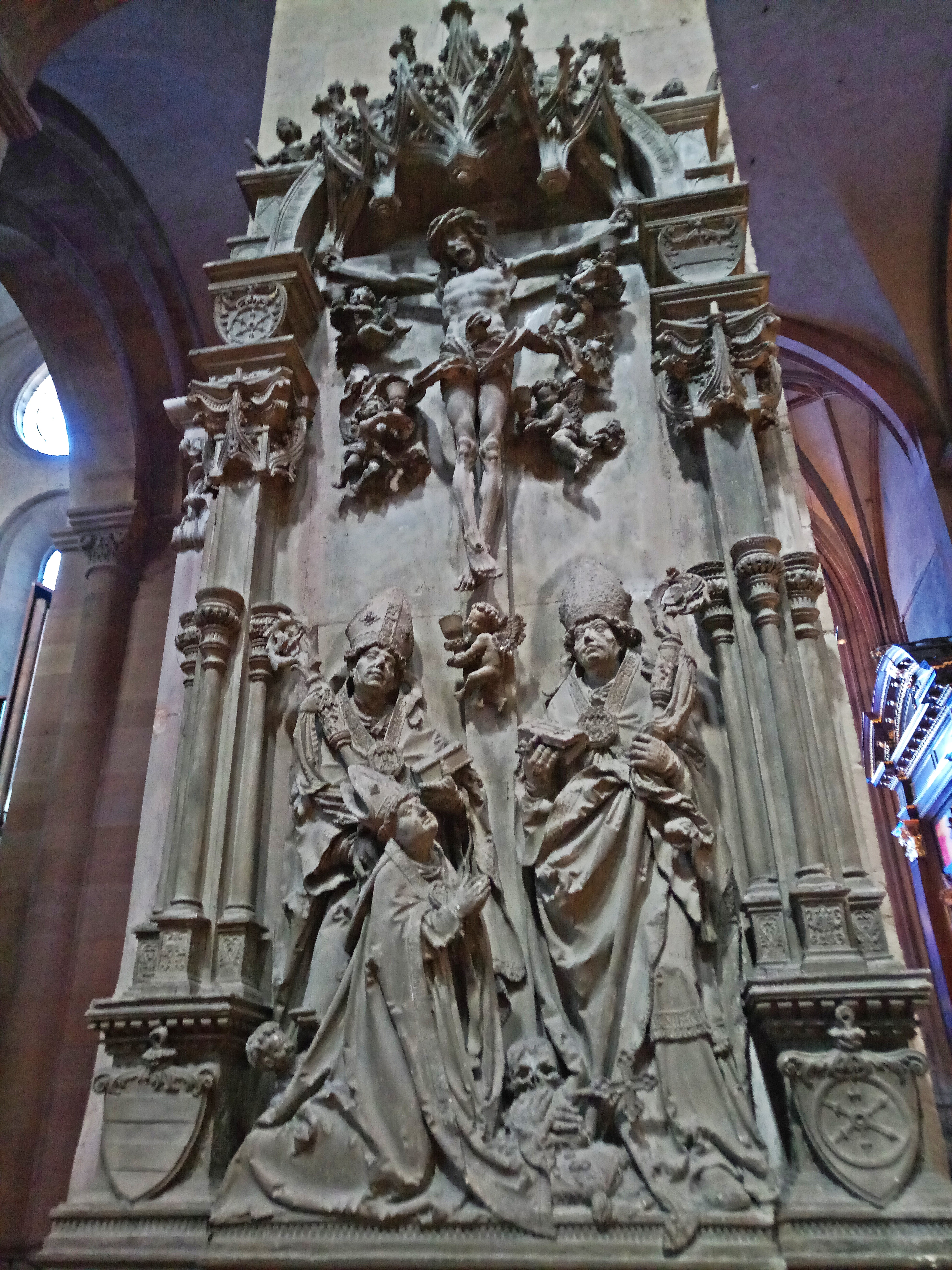 Mainzer Dom, Grabmal Bischof Uriel von Gemmingen (+ 1514)